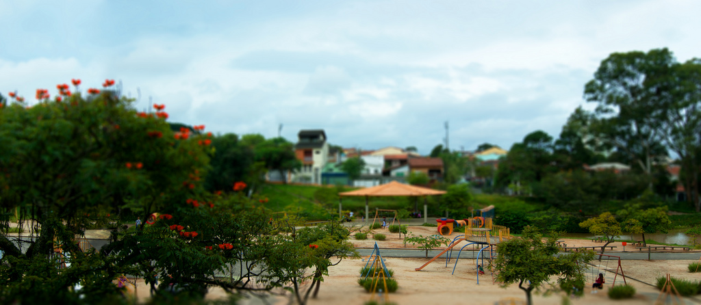 Foto realizada no parque Regional da Criança Palhaço Estremelique, a foto panorâmica captura boa parte do playground principal e utilizei um tratamento de imagem Tilt-Shift para reforçar a ideia de brincadeiras de criança.